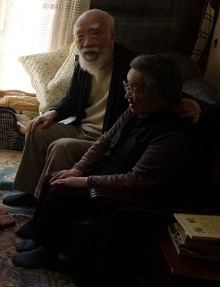 2018년 삼일절 자택에서의 정경모 부부